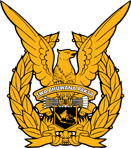 Gambar ini adalah Lambang Tentara Nasional Indonesia-Angkatan Udara